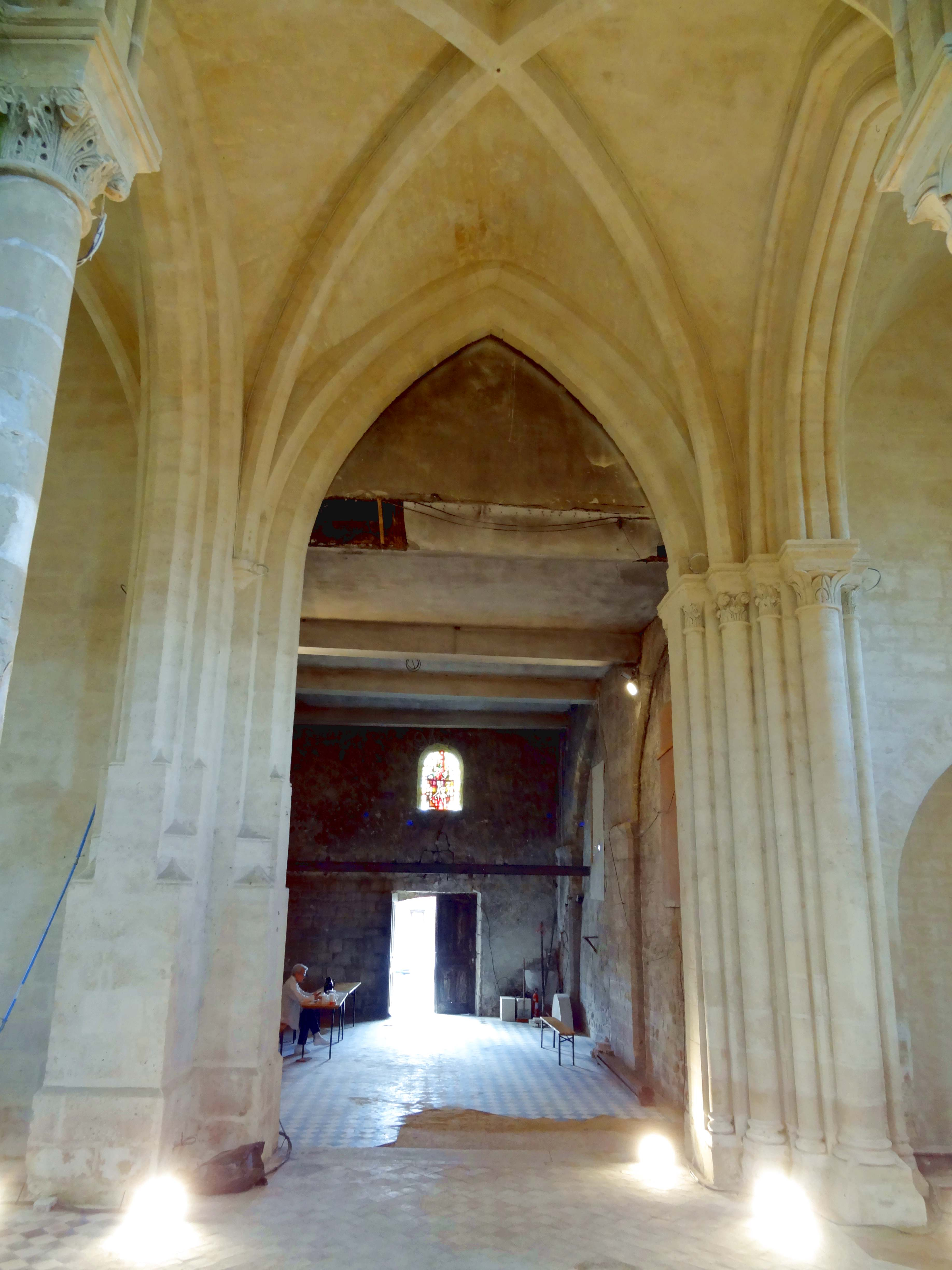 Intérieur de l'église - voir titre.